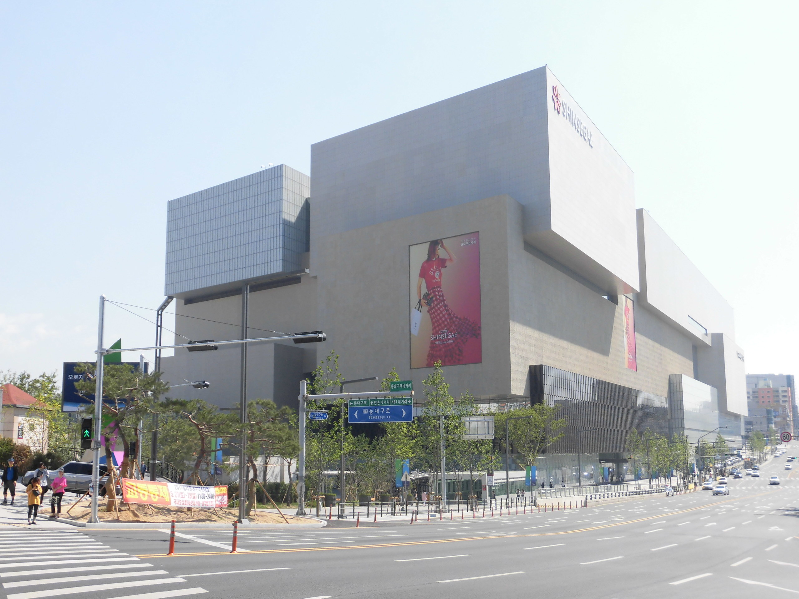 대구광역시 동구에 있는 동대구복합환승센터